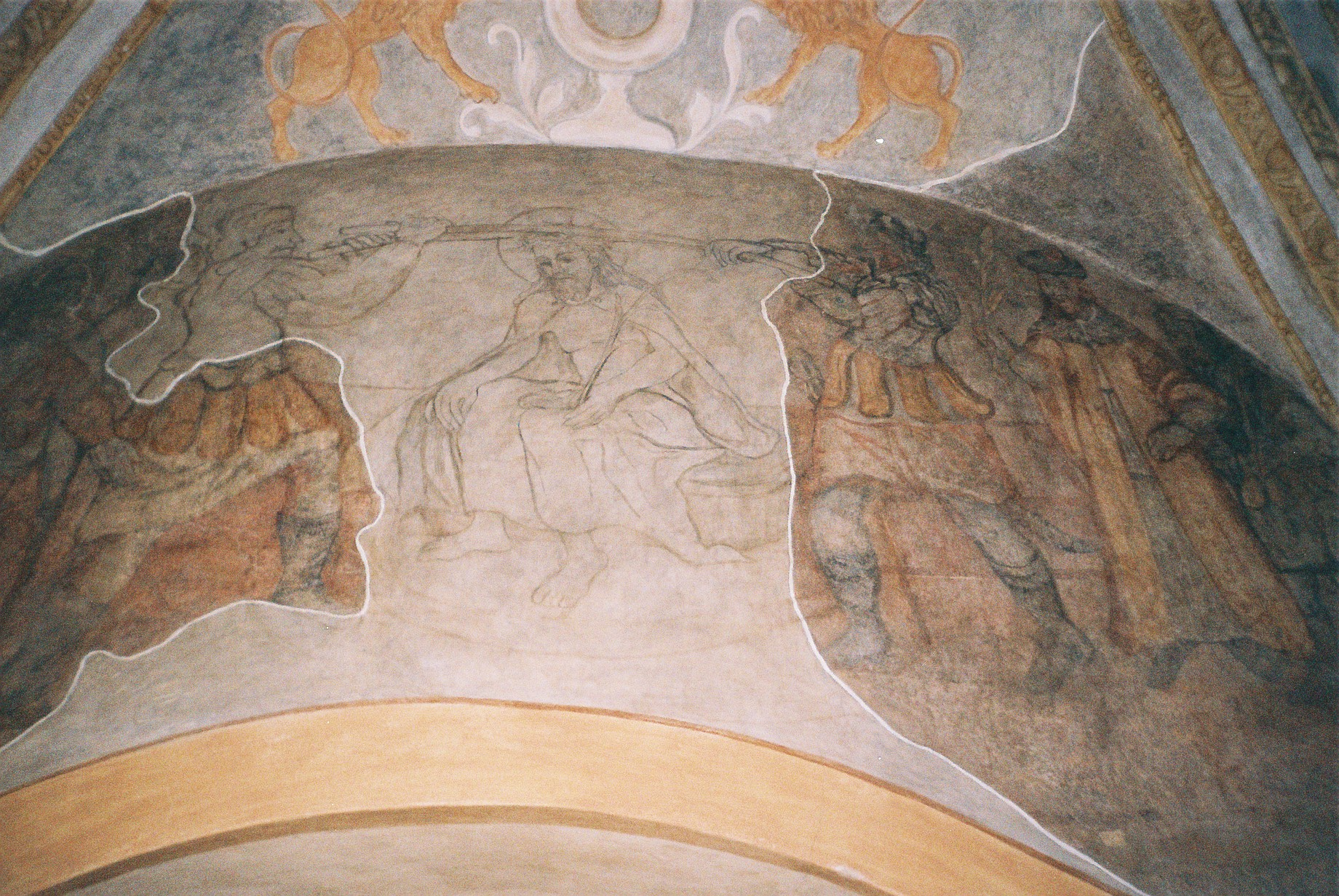 kamienica Gruszewiczów - wnętrze 6